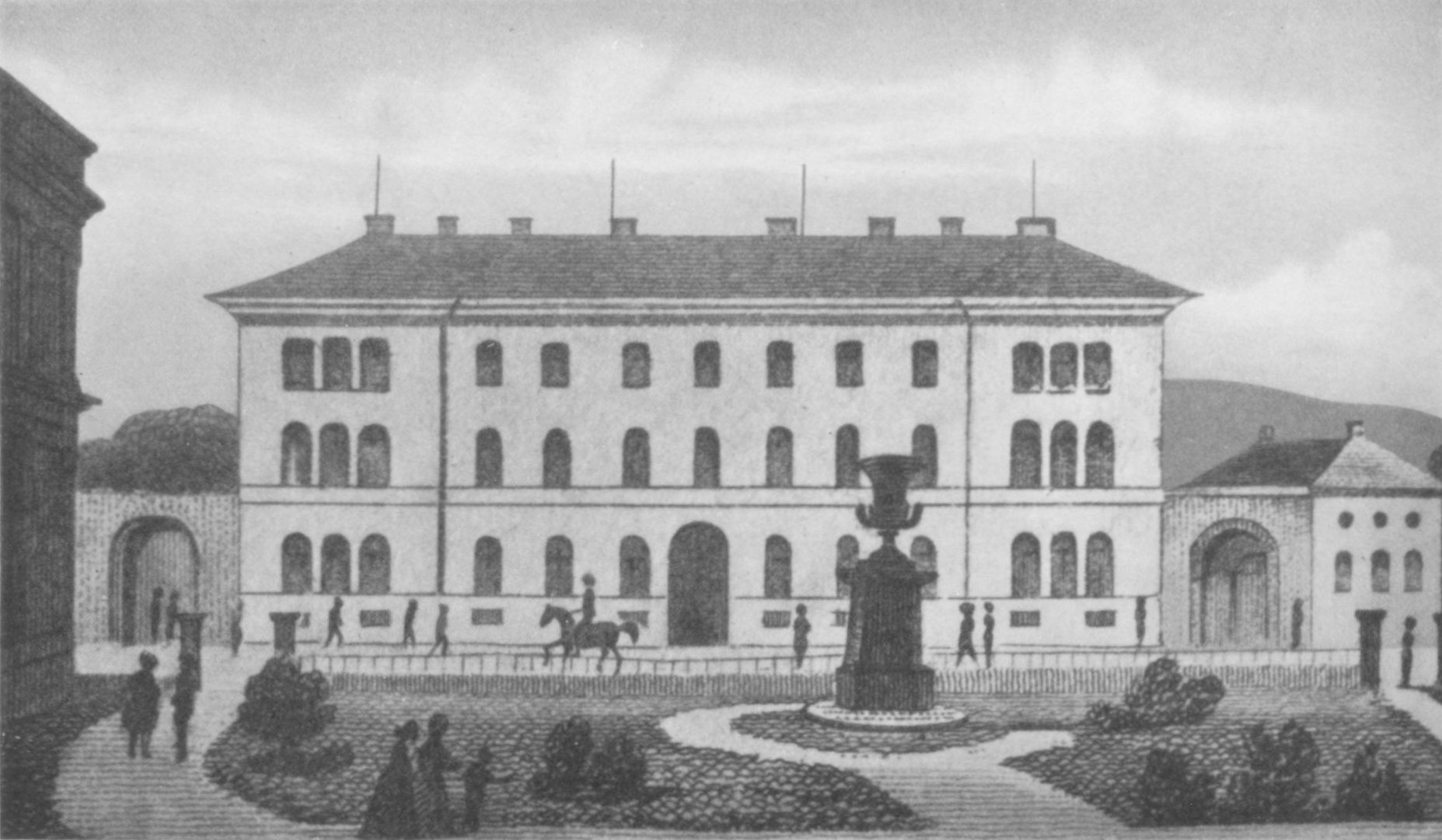 Königliches Münzgebäude in der Neckarstraße 19 in Stuttgart, gegenüber der Gemäldegalerie (heute Alte Staatsgalerie), Kupferstich, 1844. Von 1844 bis 1967 Sitz der Stuttgarter Münze. Im Vordergrund Vorgarten der Gemäldegalerie mit der Liebesvase von Friedrich Distelbarth.